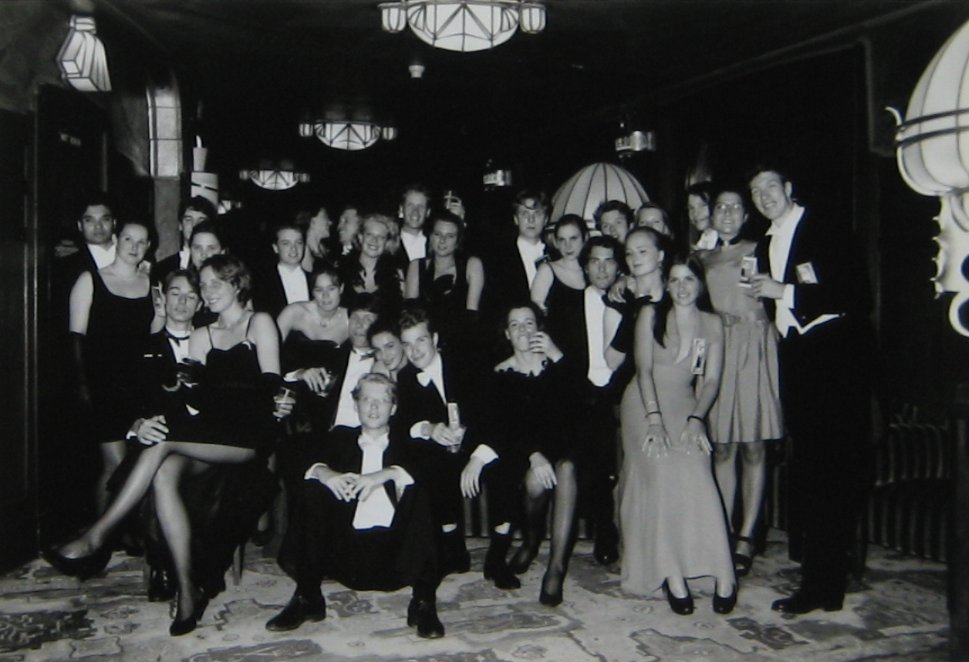 Gala foto van SSRA (SSRA is een studentenvereniging in Amsterdam.)